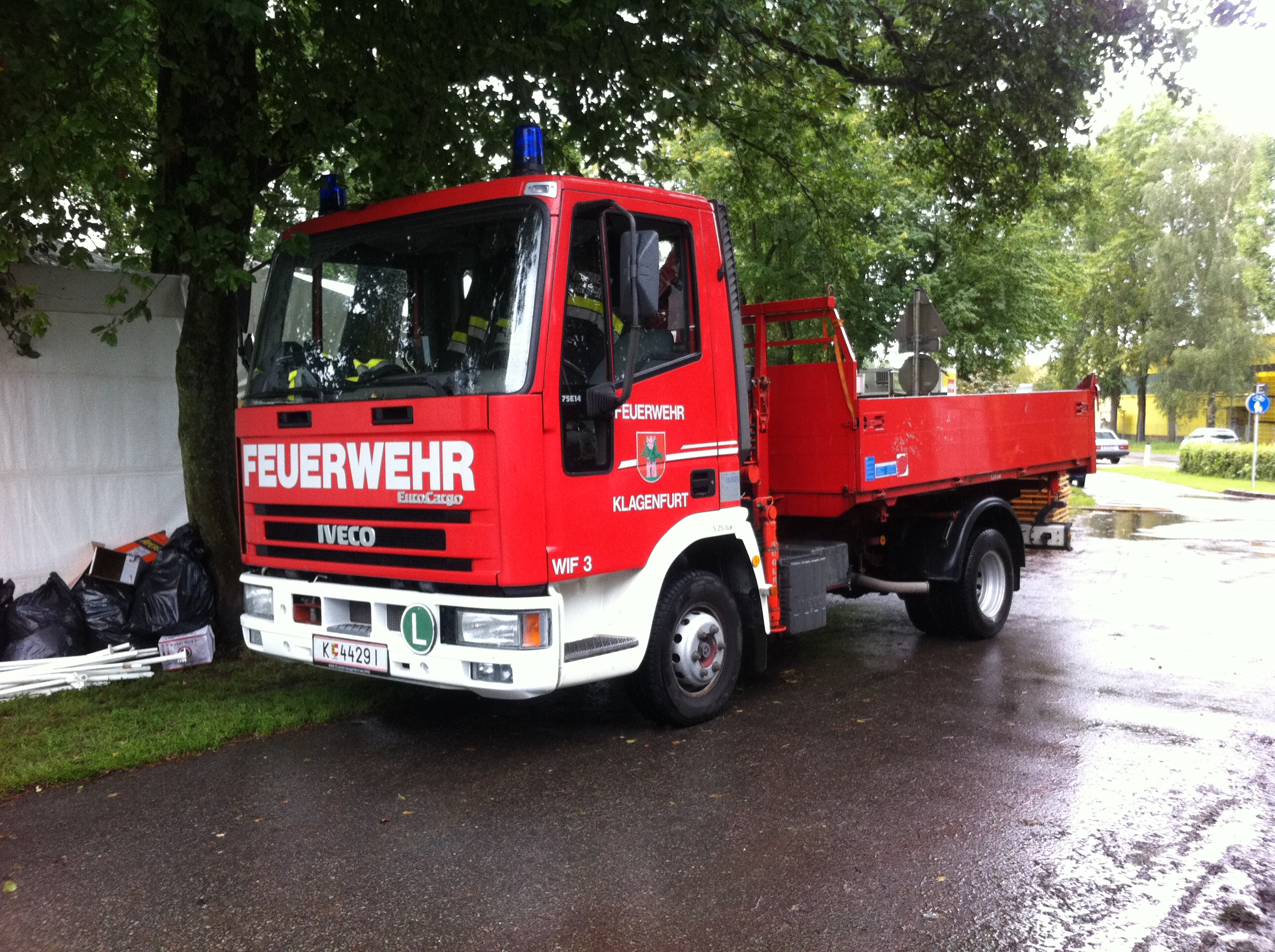 Das WIF 3 der Feuerwehren der Stadt Klagenfurt